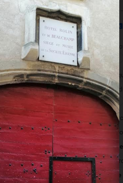 La Société Eduenne à l'origine du musée